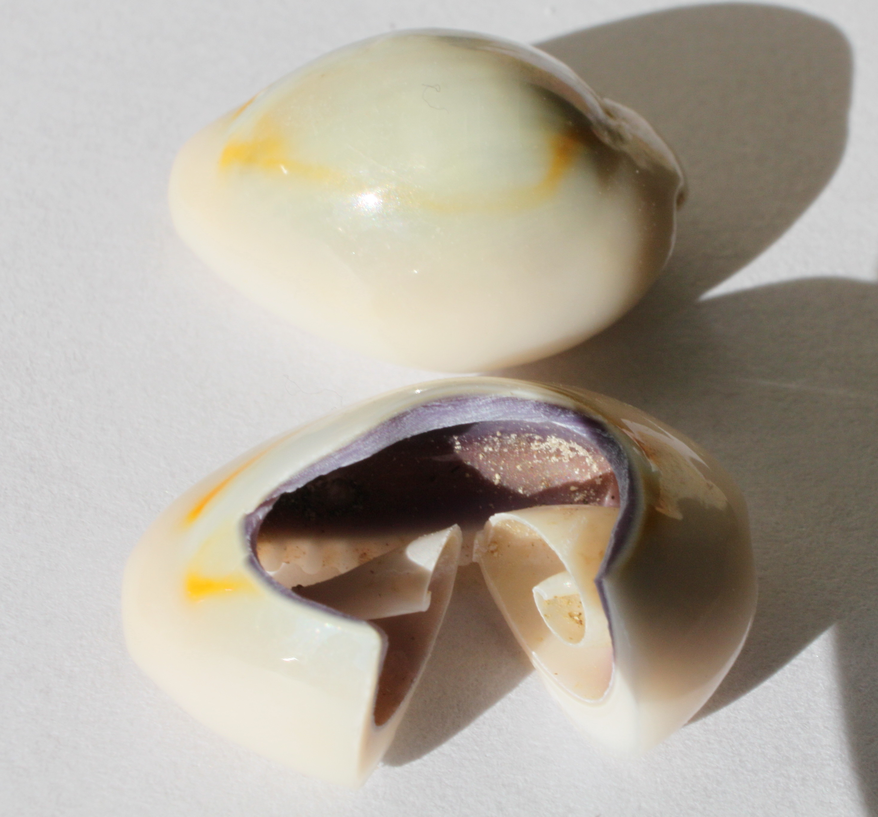 Gehäuse der Monetaria annulus (Ringkauri)), teilweise aufgefräst. Diese wurden neben der Monetaria moneta (Geldkauri) als Kaurigeld verwendet